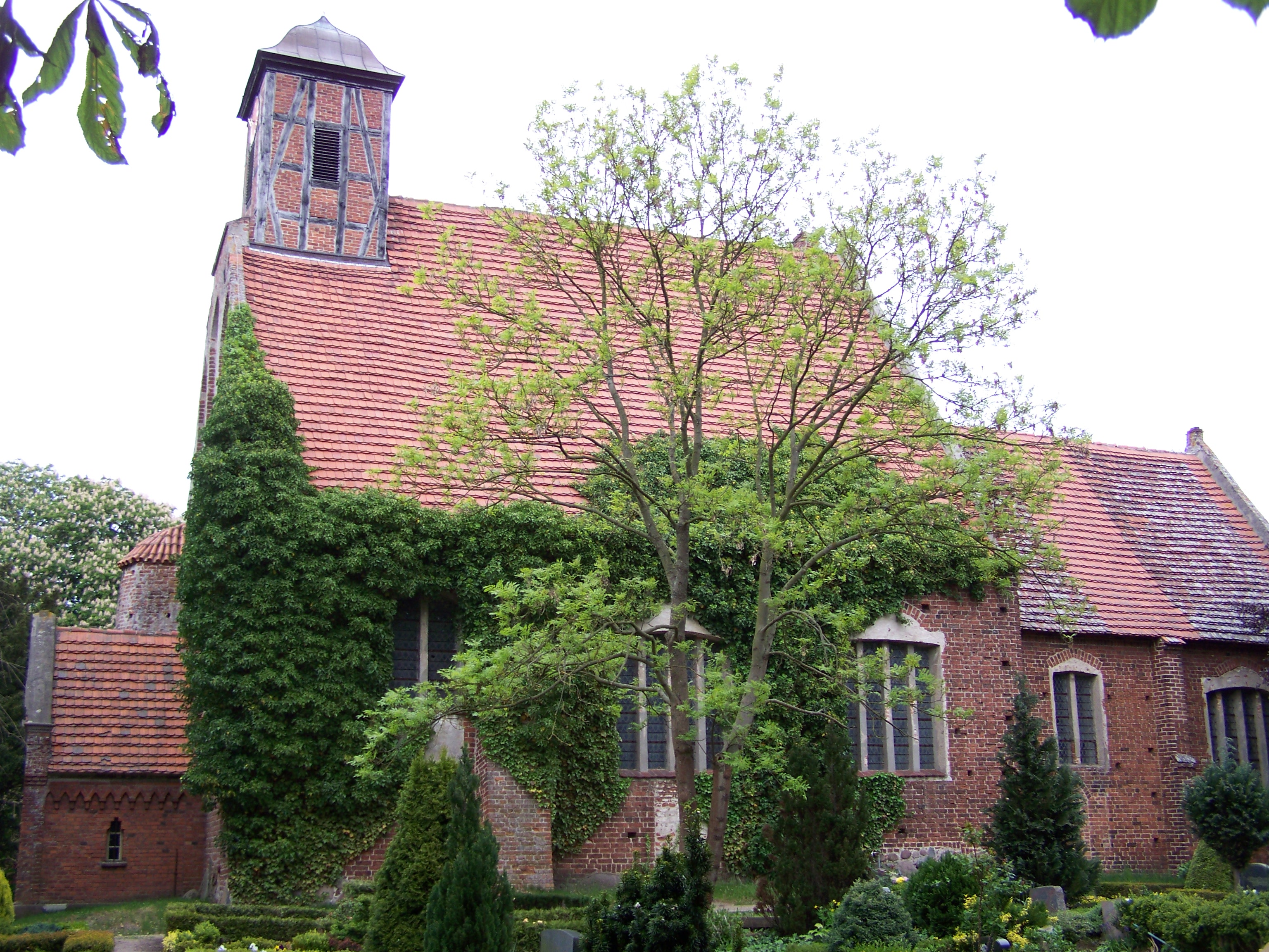 Die Kirche Samtens auf Rügen, Blick von Süden (2009-05-17)